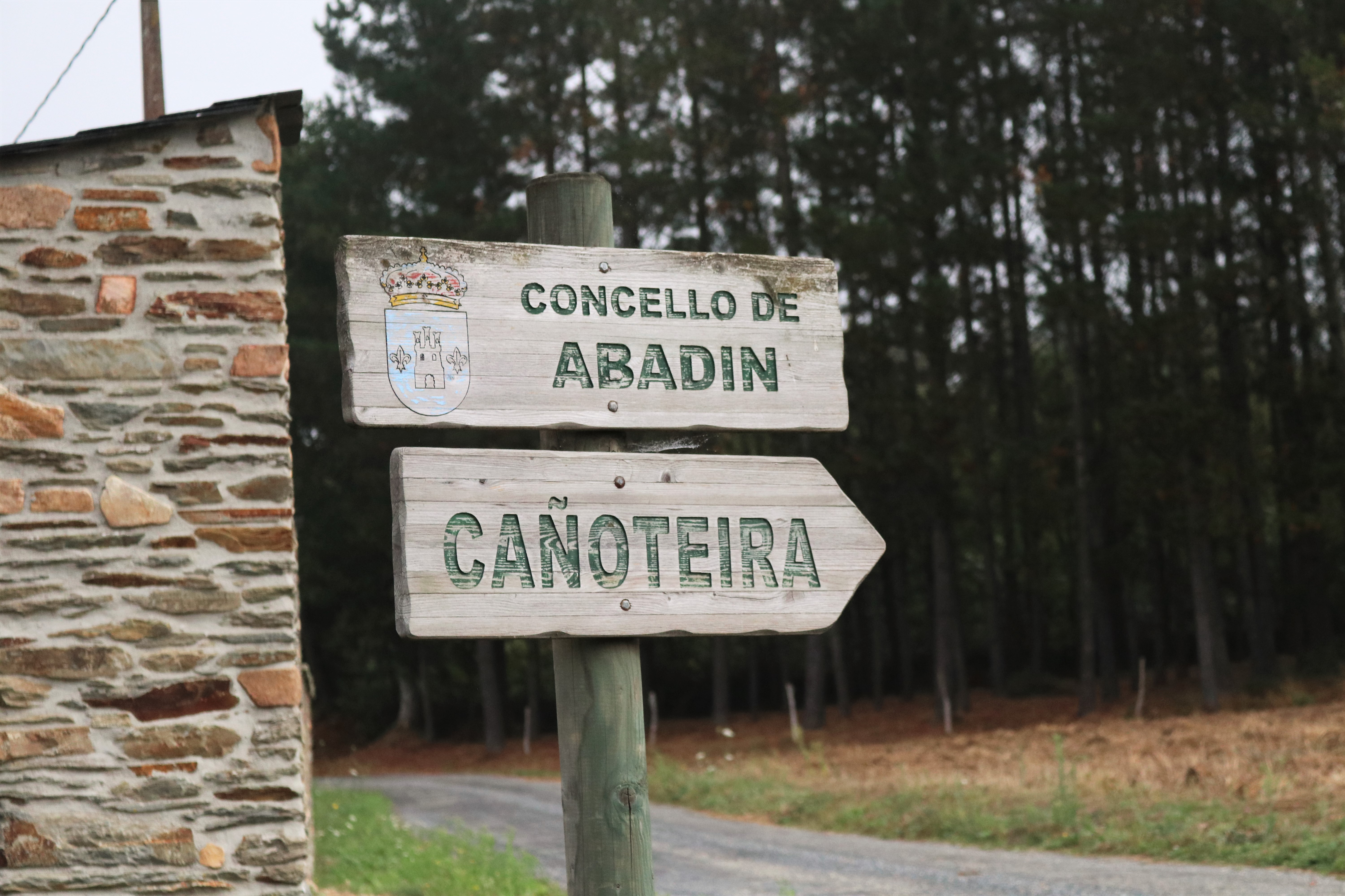 A Cañoteira, Moncelos, Abadín.